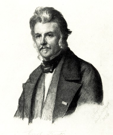 Porträt des Malers und Dichters Ernst Förster